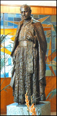 Escultura del Padre Manyanet en la capilla del Colegio Padre Manyanet de Alcobendas